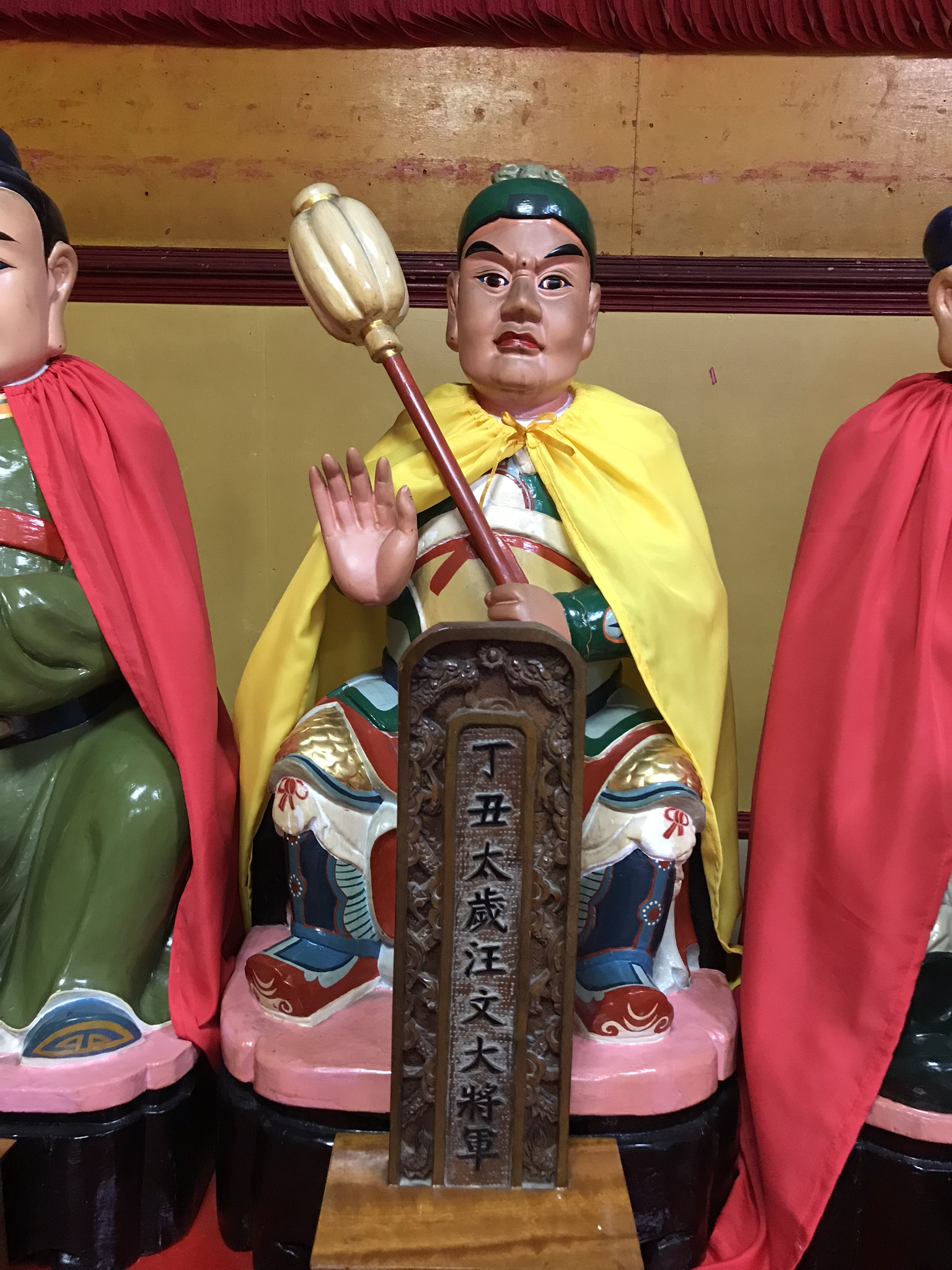 丁丑太歲汪文大將軍神像